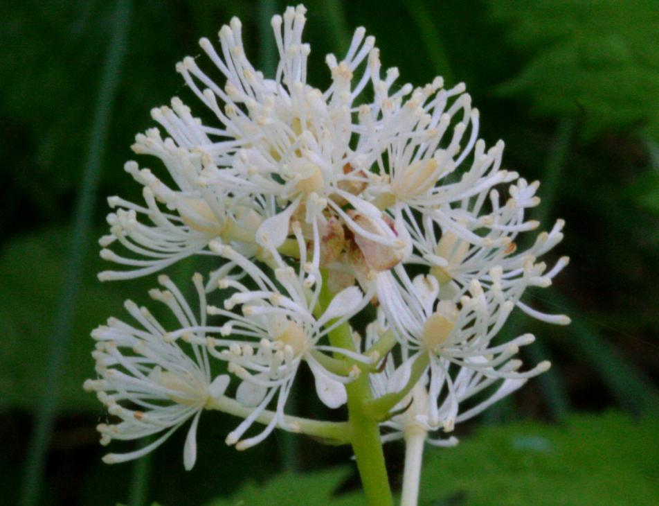 Barba di capra - Val Piana, Limana (BL), 850 m s.l.m.